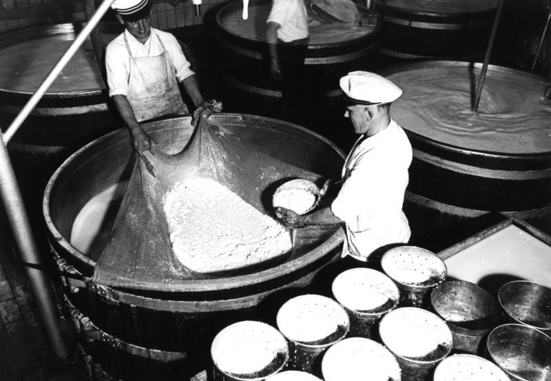 Neukirch /Ostpreußen (Elbniederung) Tilsiter Käseherstellung